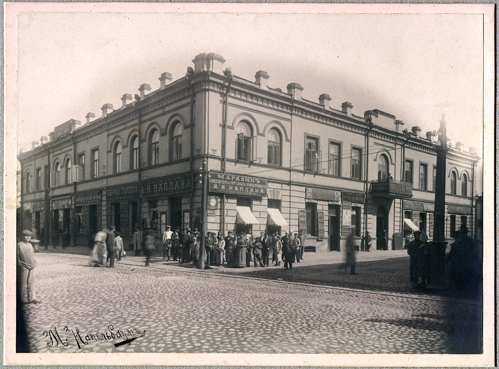 Беларуская (тарашкевіца): Менск (Miensk), рог вуліц Францішканскай (vulica Franciškanskaja) і Юраўскай (vulica Juraŭskaja). Касьцёл Сьвятога Антонія і кляштар францішканаў па перабудове расейскімі ўладамі пад мескую ўправу